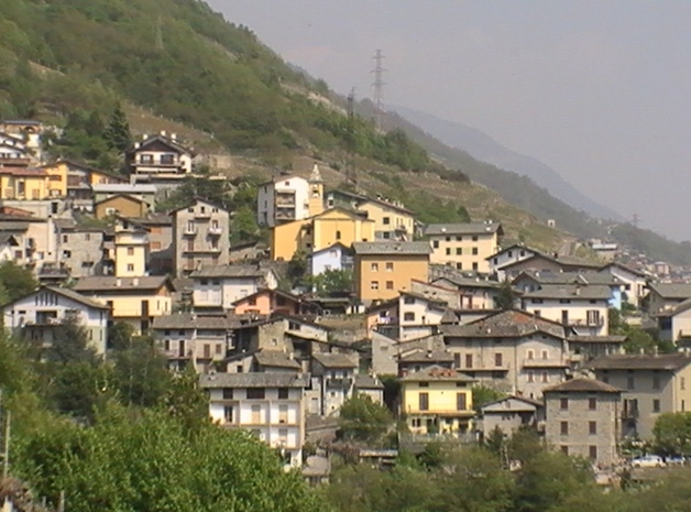 Ponchiera vista da Mossini